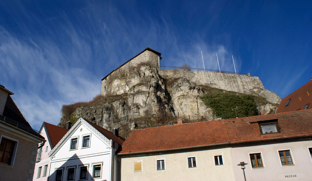 Blick vom Marktplatz zur Ruine Laaber